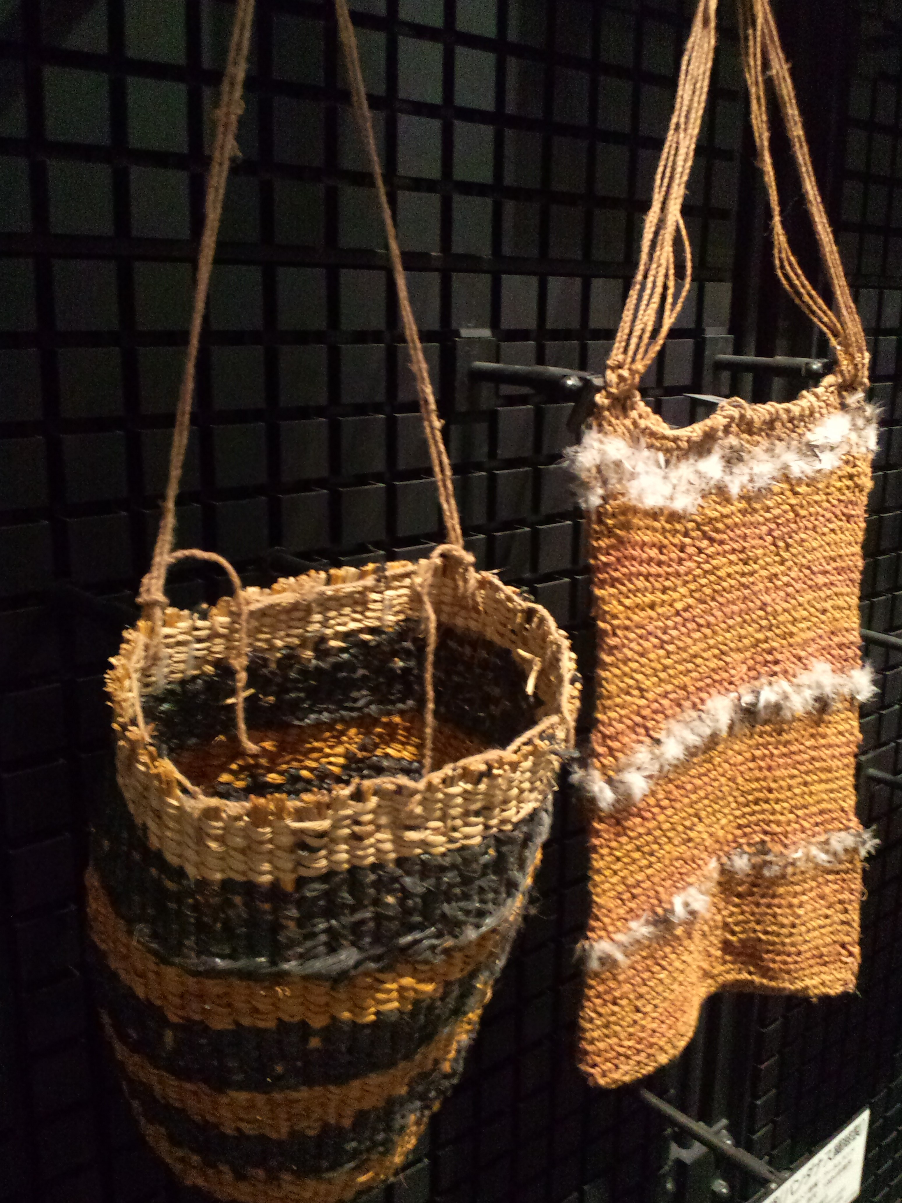 国立民族学博物館（大阪） あみ袋（パンダナス繊維製、オーストラリア、アーネムランド）